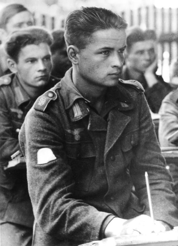 Russischer Freiwilliger der Wlassow-Armee